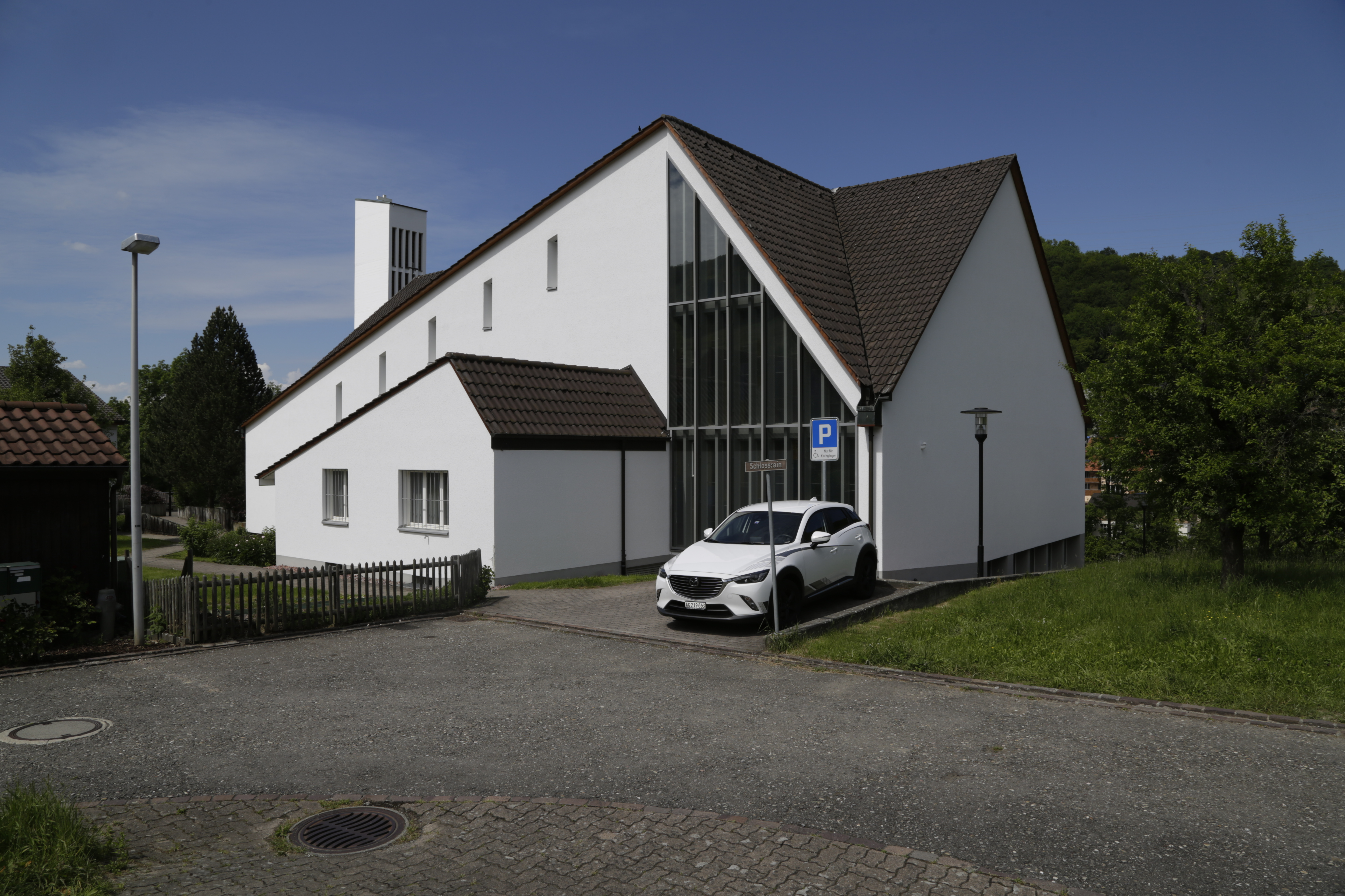 Die neue römisch katholische Kirche von Obermumpf